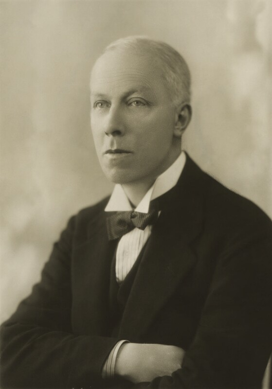 Graham White